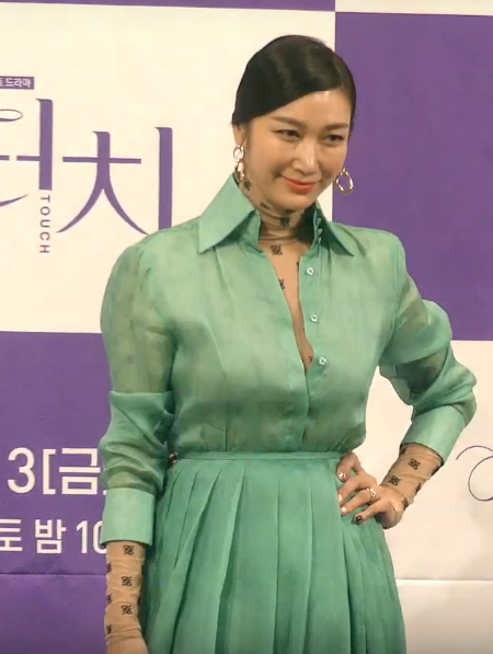 1월 3일 오후 서울시 강남구 논현동 임피리얼 팰리스 서울에서 채널A 새 금토드라마 '터치' 제작발표회가 열려 배우 주상욱 김보라 이태환 한다감 변정수가 참석해 포토타임을 갖고 있다.